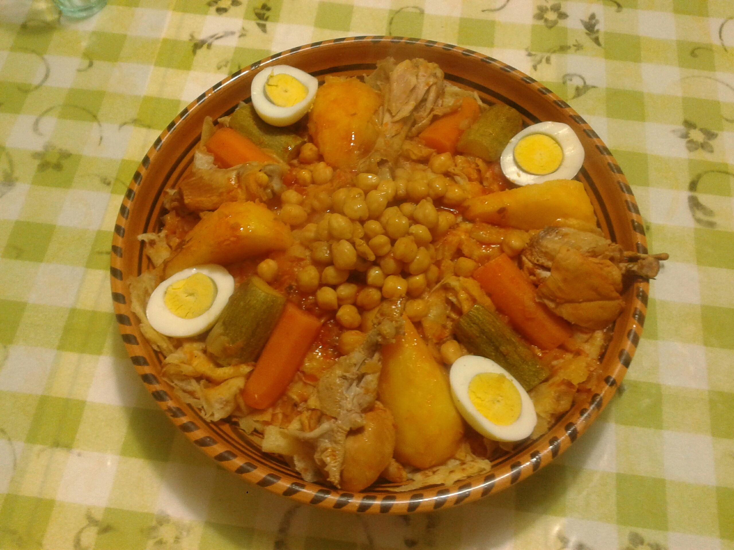 شخشوخة المسمن، شخشوخة الملاوي